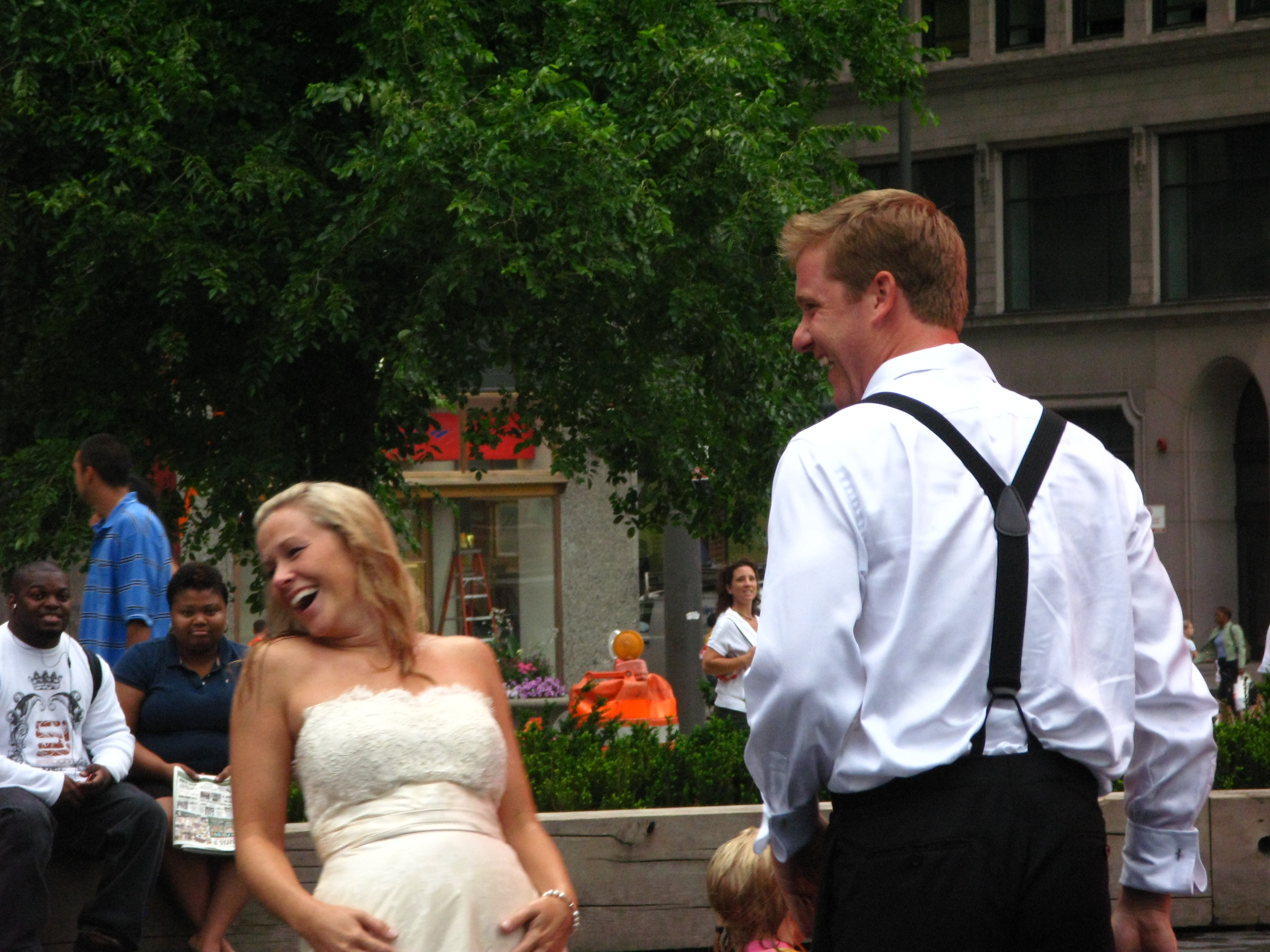 Newlywed couple